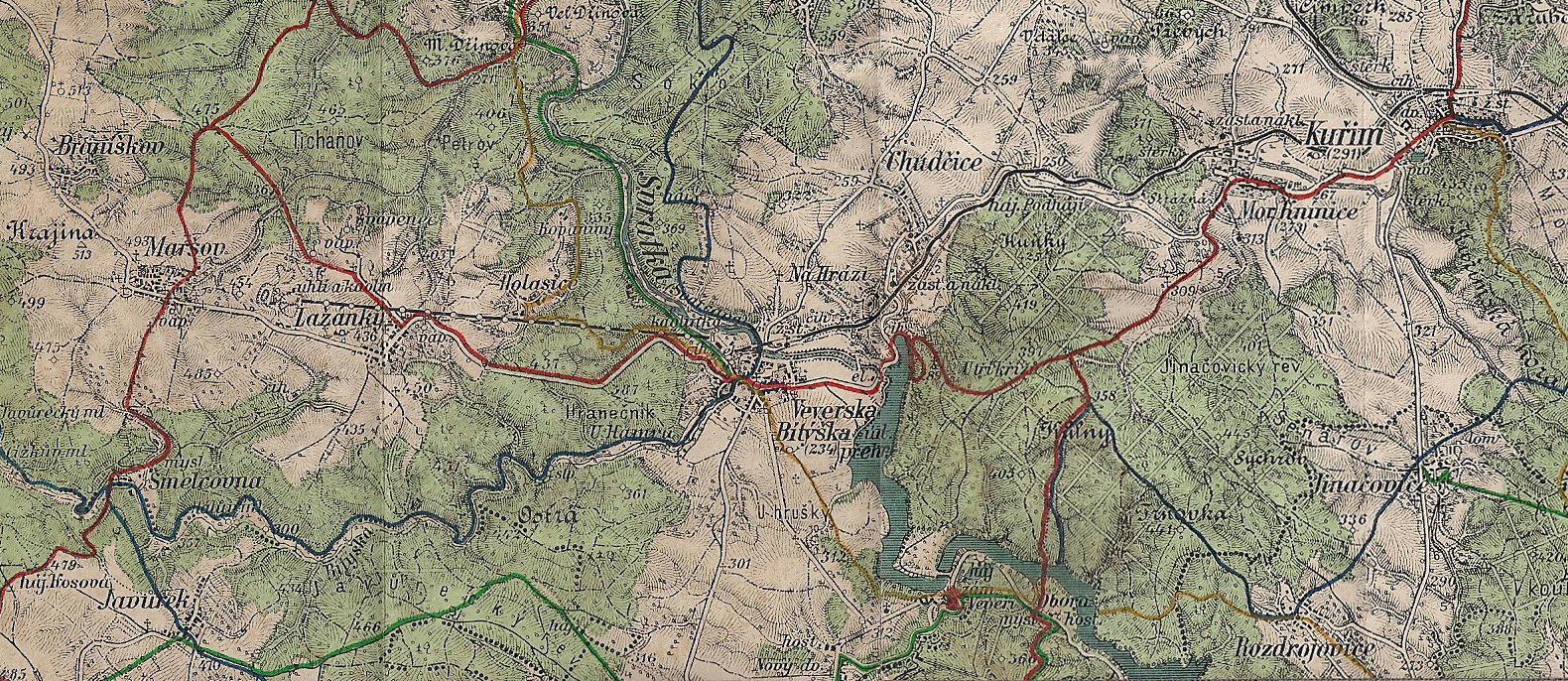 Okolí Veverské Bítýšky s železniční tratí od Kuřimi a nákladní lanovkou na Maršov